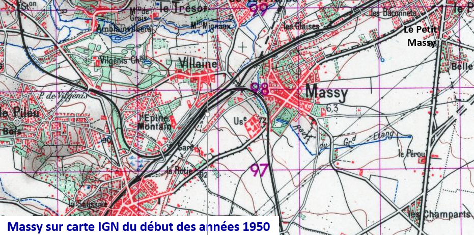 Massy au début des années 1950